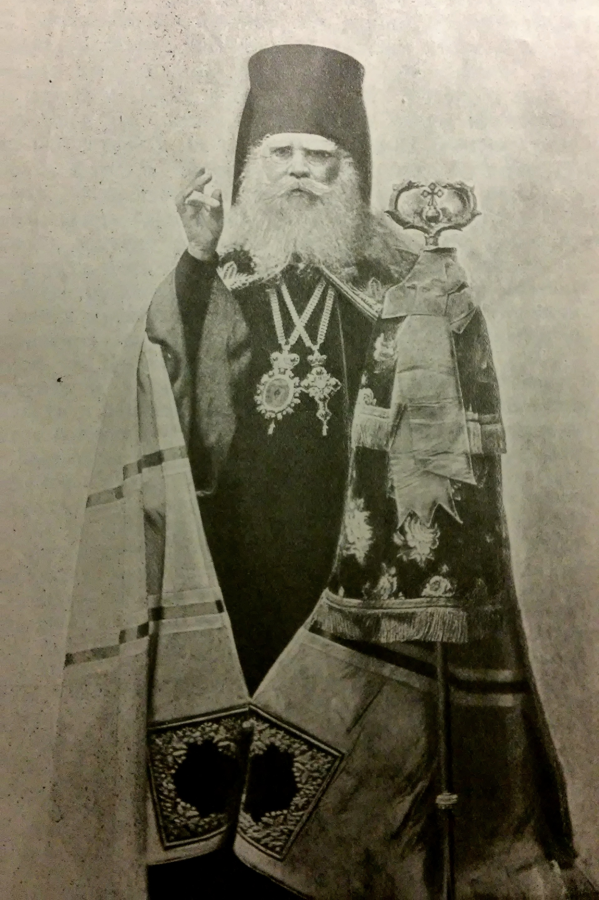 Hieronim (Egzemplarski) jako arcybiskup chełmski i warszawski